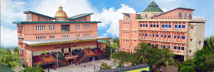 gedung teknokrat